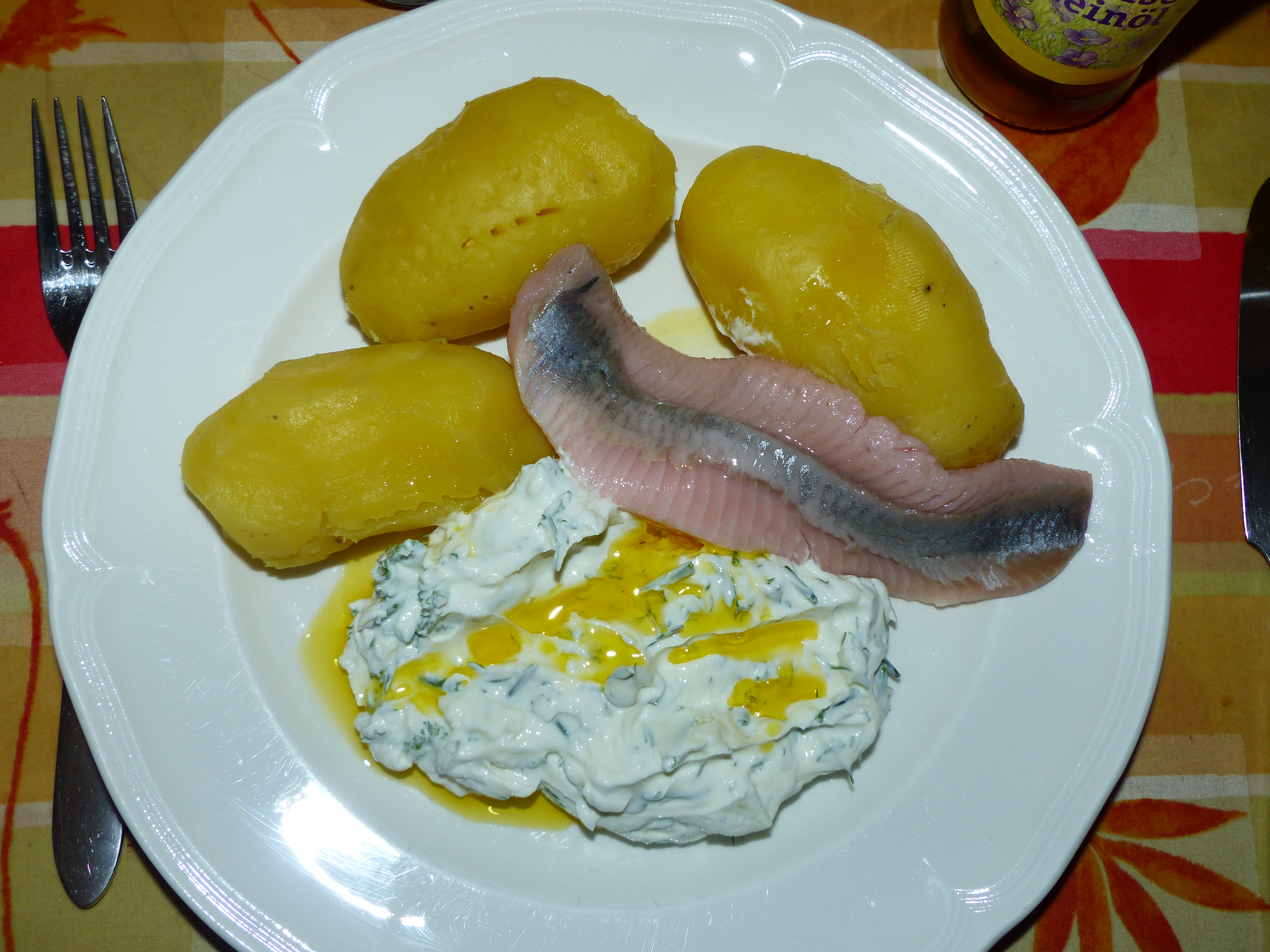 Quark mit Leinöl (hier als Kräuterquark) und Pellkartoffeln, sowie mit mariniertem Hering